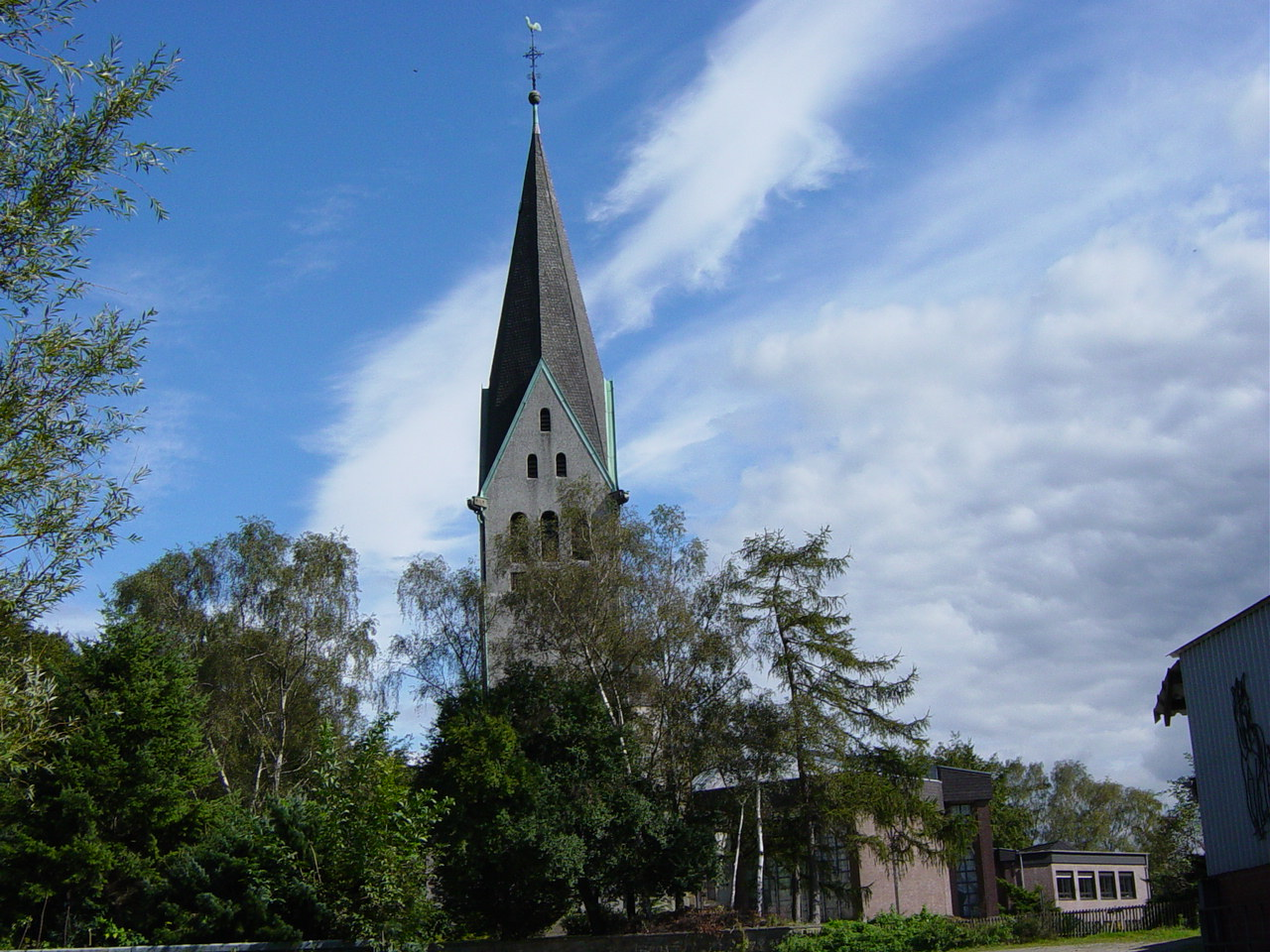 Kath. Kirche St. Johannes Baptist, Dortmund-Kurl